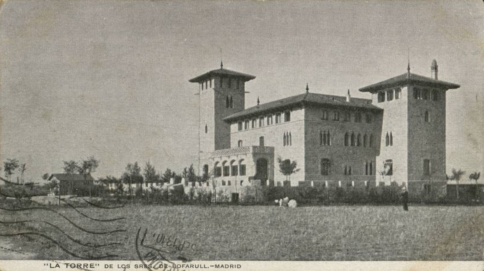 Tarjeta postal con número de inventario 24774 en "Memoria de Madrid". Puede verse la llamada "Torre de los señores de Bofarull", edificio modernista desaparecido, que estuvo situado en el Alto de Extremadura, en Madrid, España. Su arquitecto fue el catalán Josep Puig i Cadafalch, quien recibió el encargo en 1910 de manos del político Manuel Bofarull de Palau, fundador y presidente del Centro Catalán de Madrid. El edificio fue demolido tras los destrozos provocados por la Guerra Civil Española.